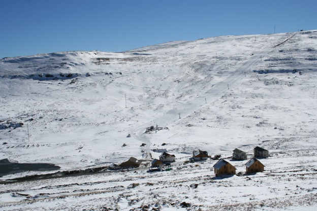 Jaco van